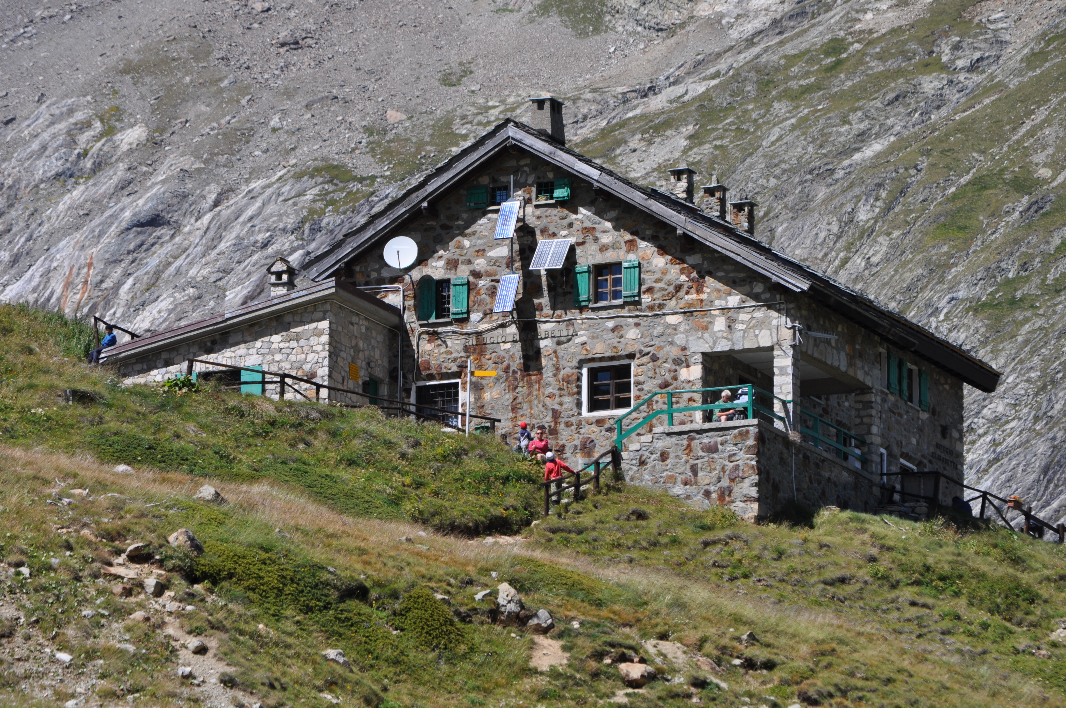 Il rifugio Elisabetta Soldini Montanaro